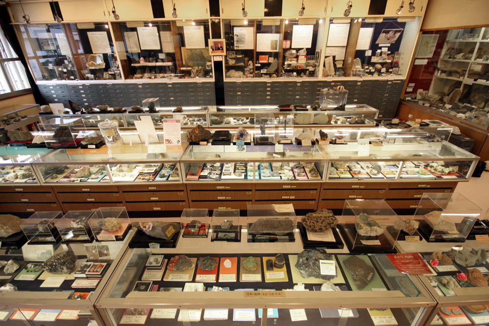 鉱物や化石標本の展示室 Canon EOS 50D